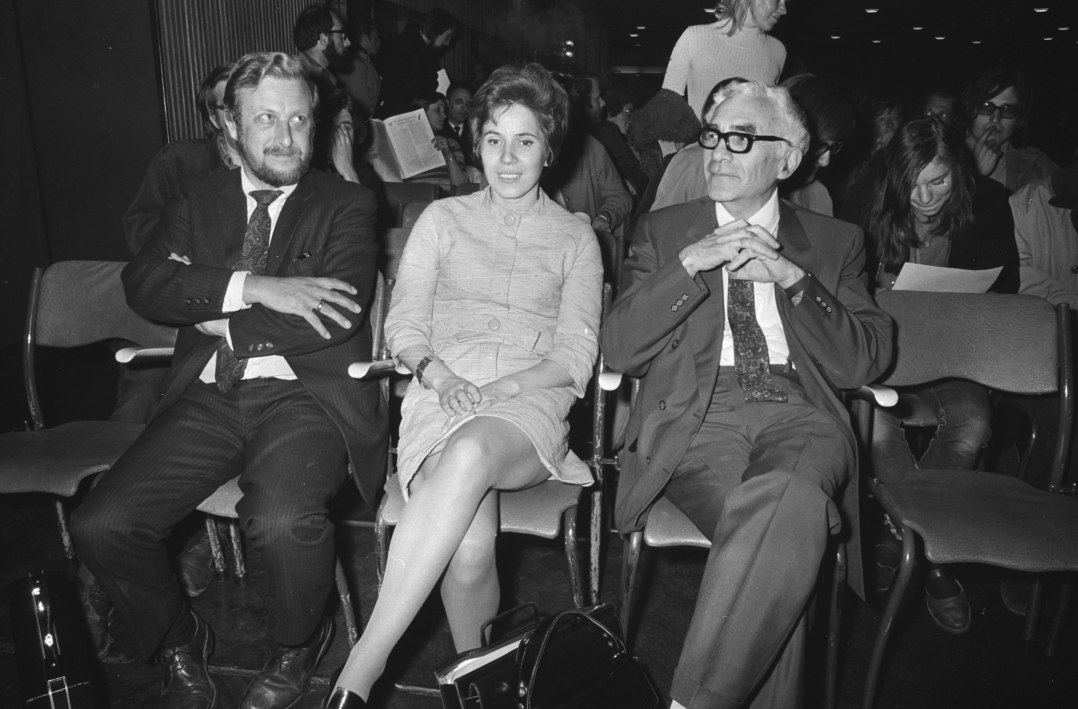 Collectie / Archief : Fotocollectie Anefo Reportage / Serie : Bijeenkomst van de Stichting J'accuse in Krasnapolsky te Amsterdam Beschrijving : V.l.n.r. Karel Roskam, Beate Klarsfeld en Han Wielek Datum : 4 mei 1971 Locatie : Amsterdam, Noord-Holland Trefwoorden : bijeenkomsten, journalisten, schrijvers Persoonsnaam : Klarsfeld, Beate, Roskam, Karel, Wielek, Han Instellingsnaam : Krasnapolsky Fotograaf : Fotograaf Onbekend / Anefo Auteursrechthebbende : Nationaal Archief Materiaalsoort : Negatief (zwart/wit) Nummer archiefinventaris : bekijk toegang 2.24.01.05 Bestanddeelnummer : 924-5165